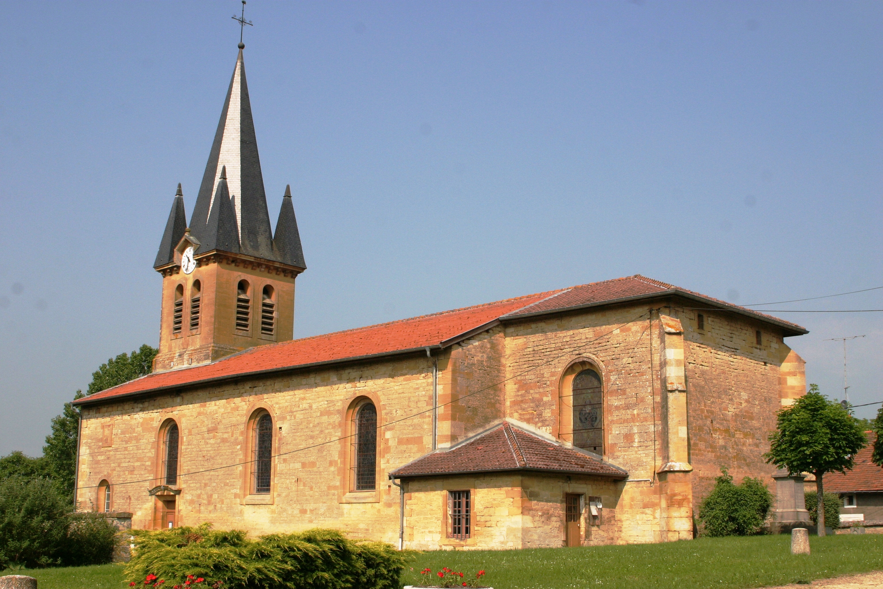 D'Kierch Saint-Brice zu Dombras.